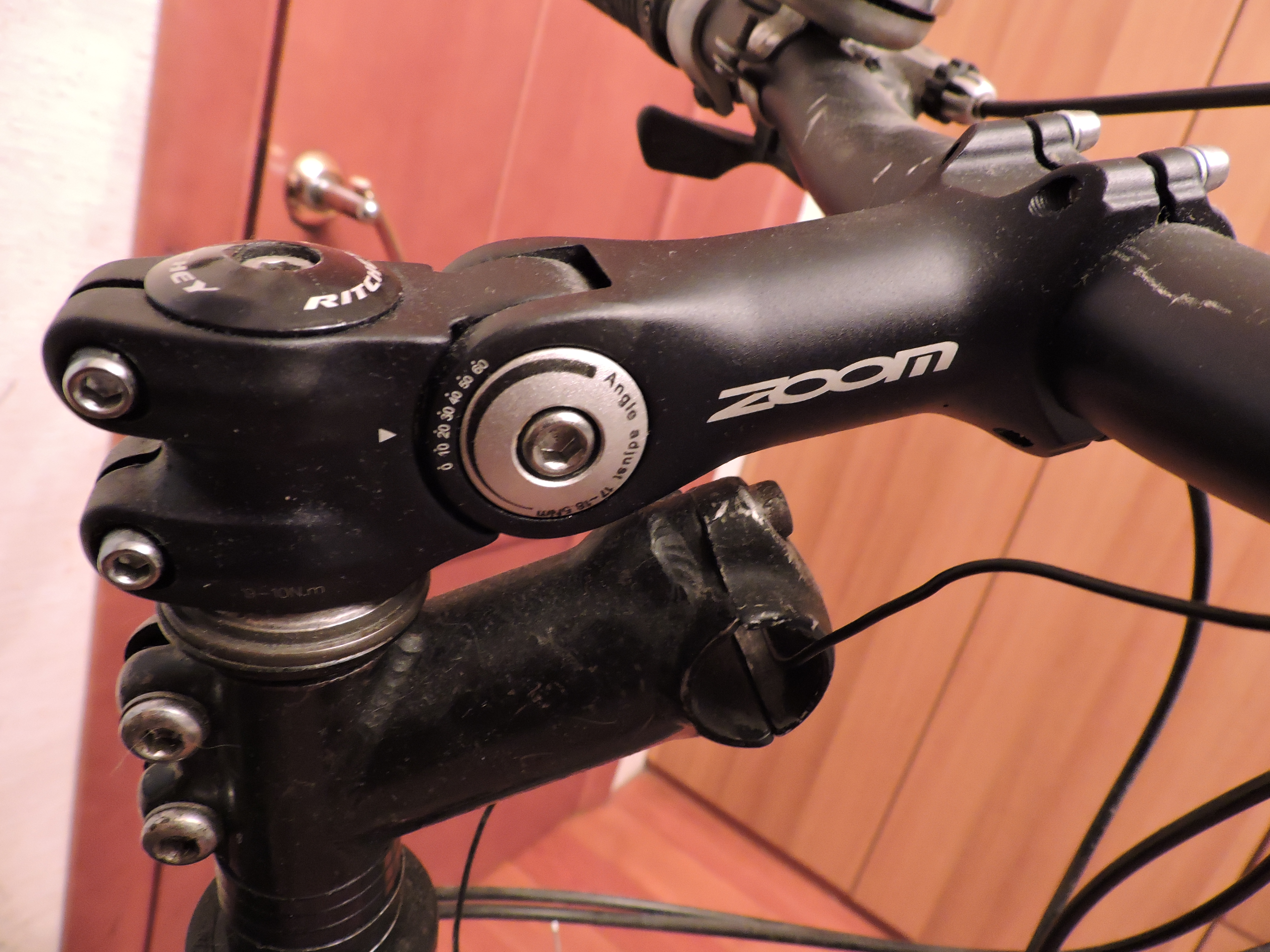 Регулируемый веловынос